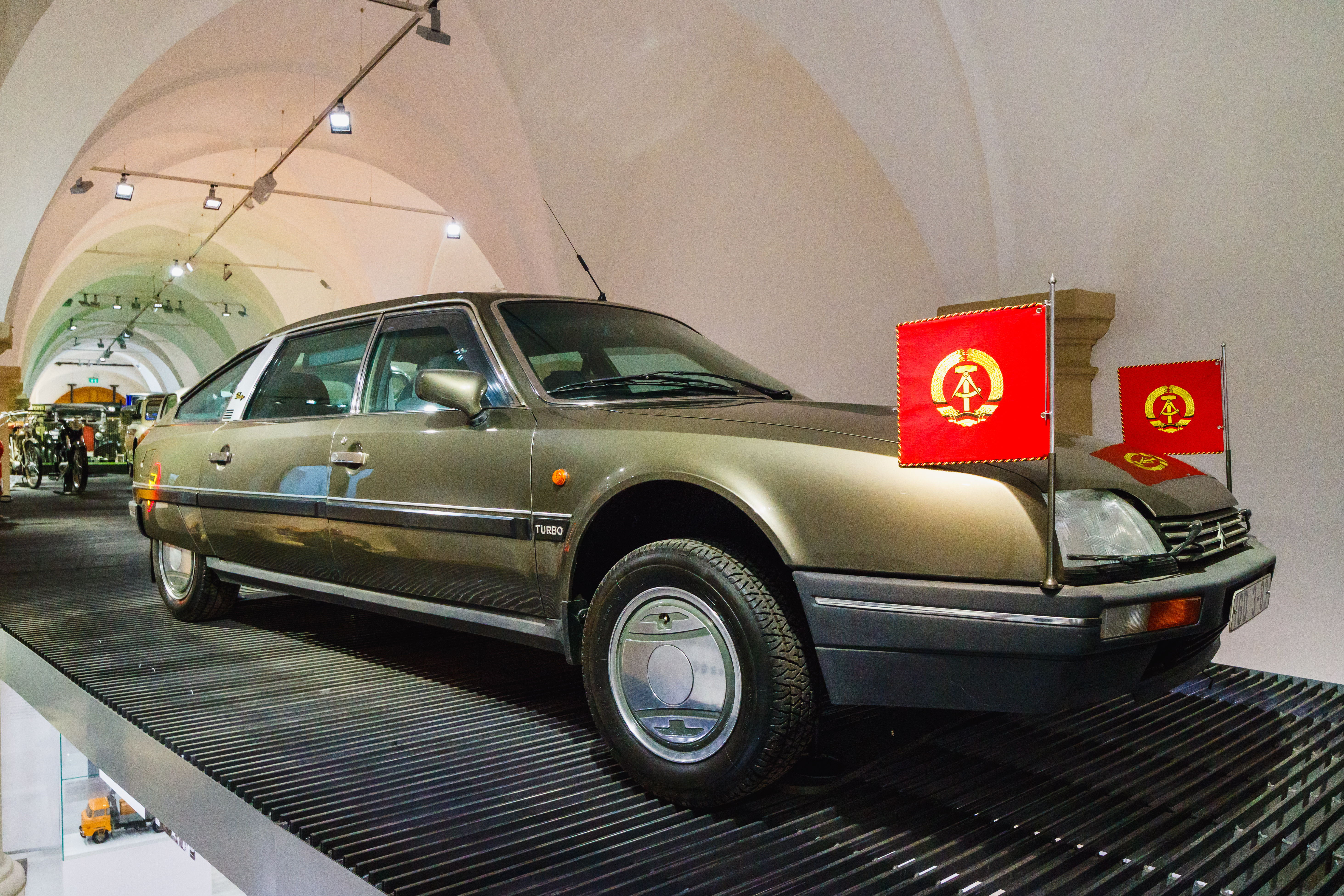 Citroen CX 25 Prestige Turbo 2 (genutzt von Erich Honecker), Verkehrsmuseum Dresden